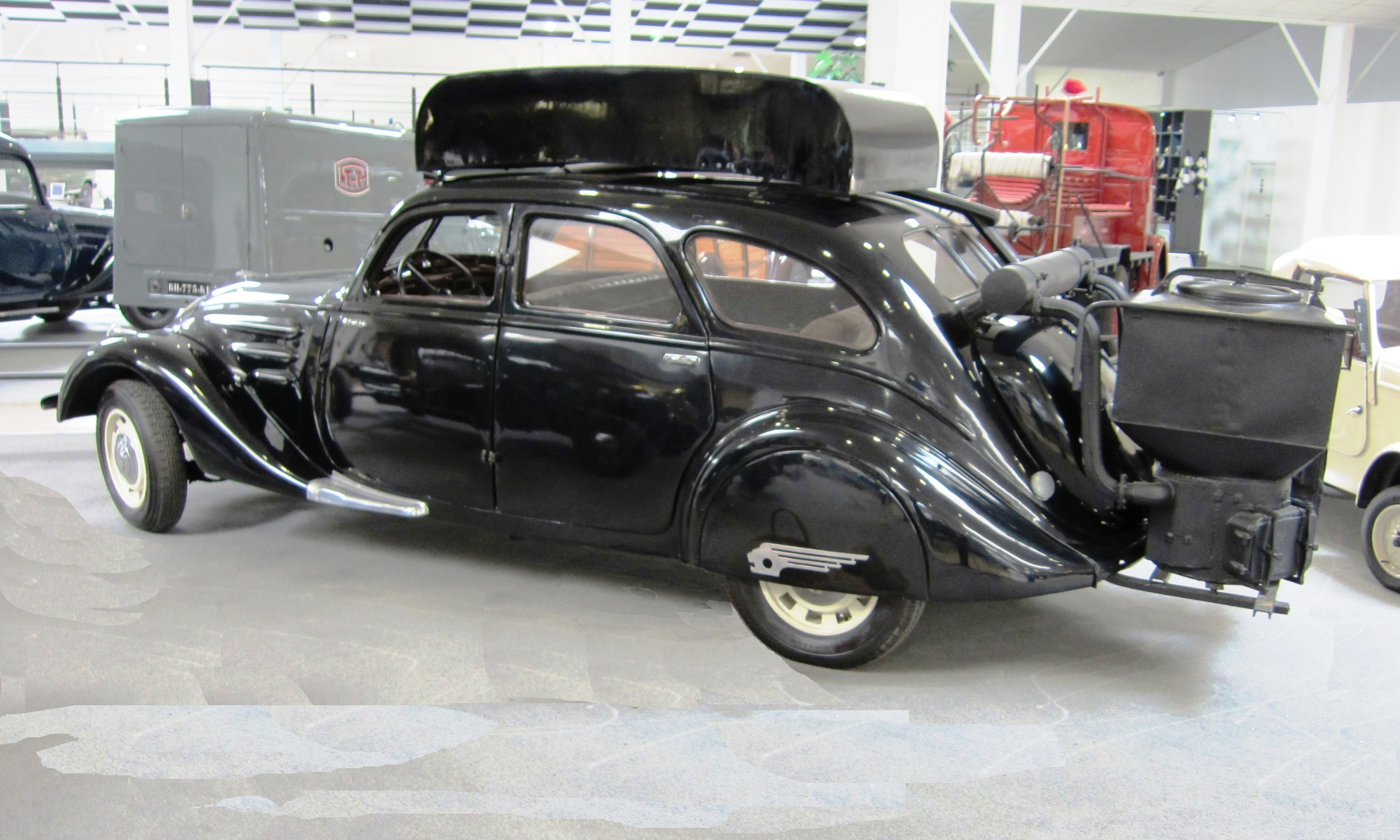 Peugeot 402B Limousine à Gazogène